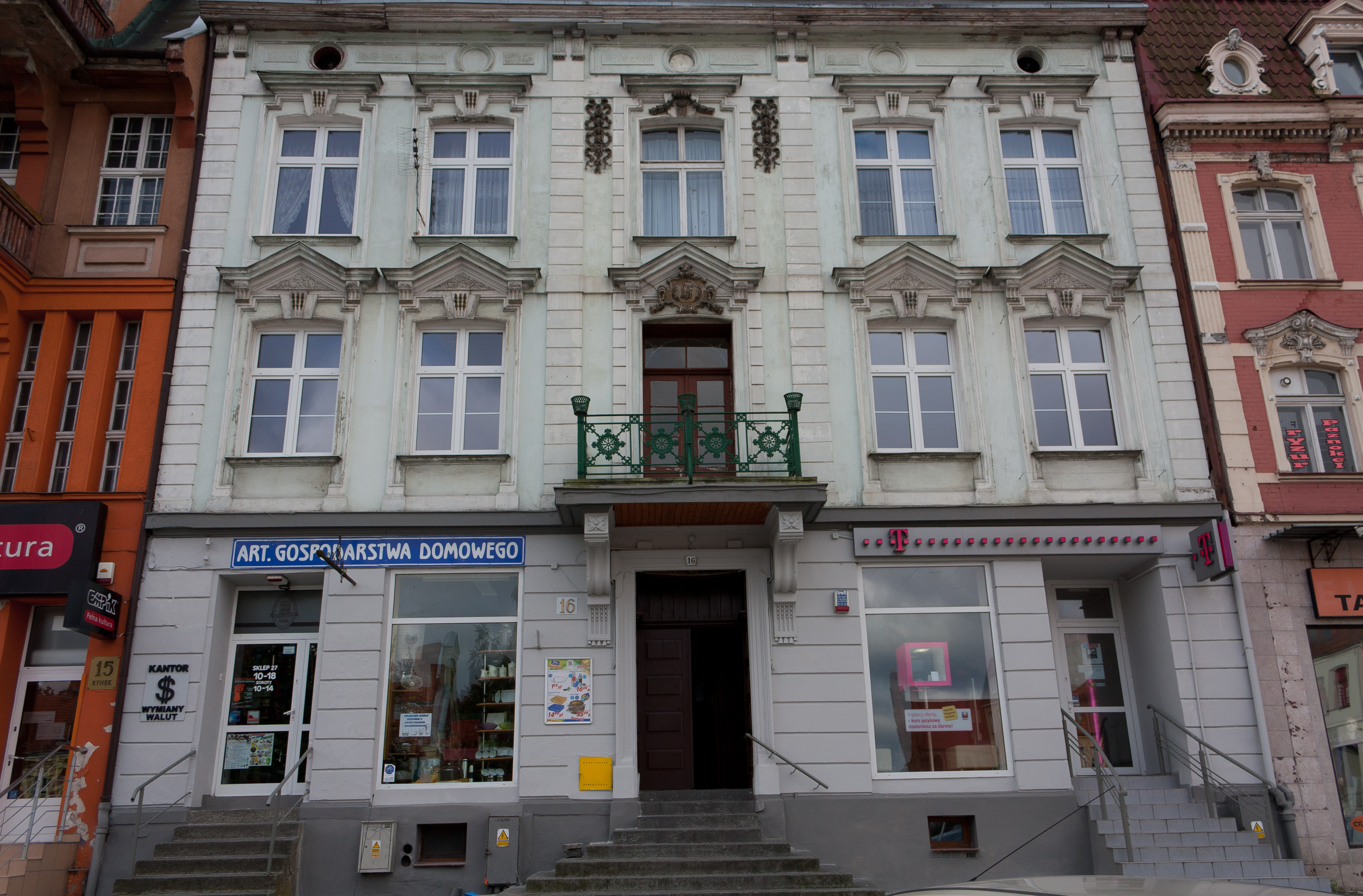 Starogard Gdański, Rynek 16 - kamienica (zabytek nr 1611)